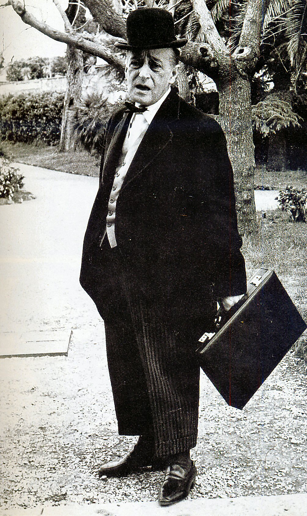 Totò in fracchesciacche